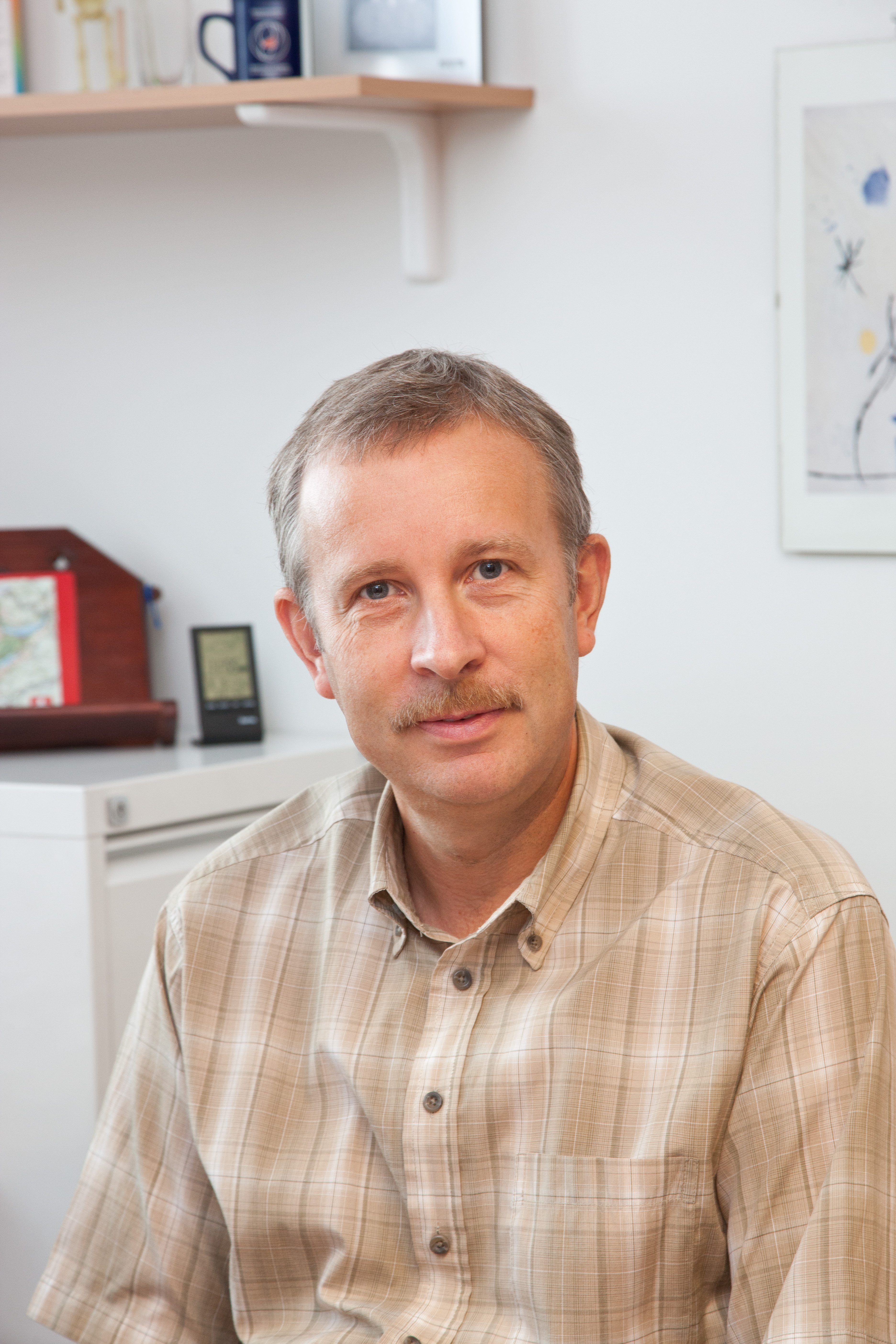 TÜ tervishoiukorralduse professor Raul-Allan Kiivet.